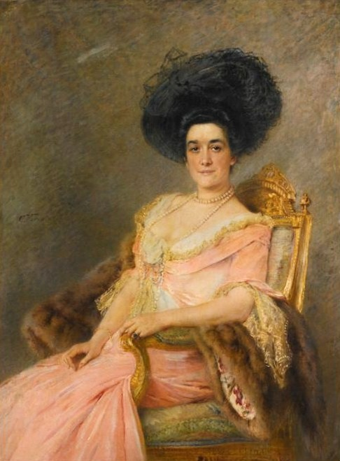 Марина Павловна Ионина, жена дипломата Александра Семёновича Ионина (1837—1900)